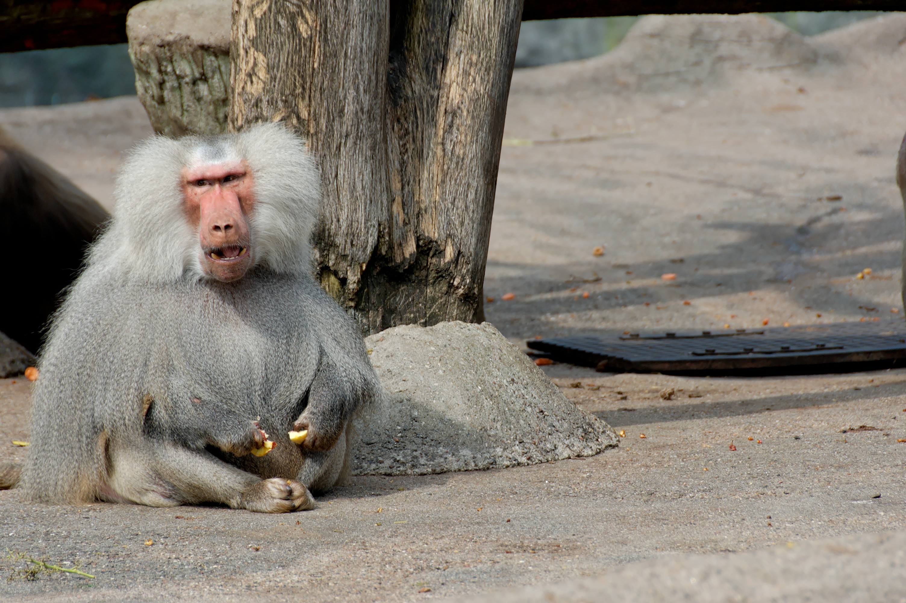 Mit freundlicher Genehmigung von Hagenbeck.